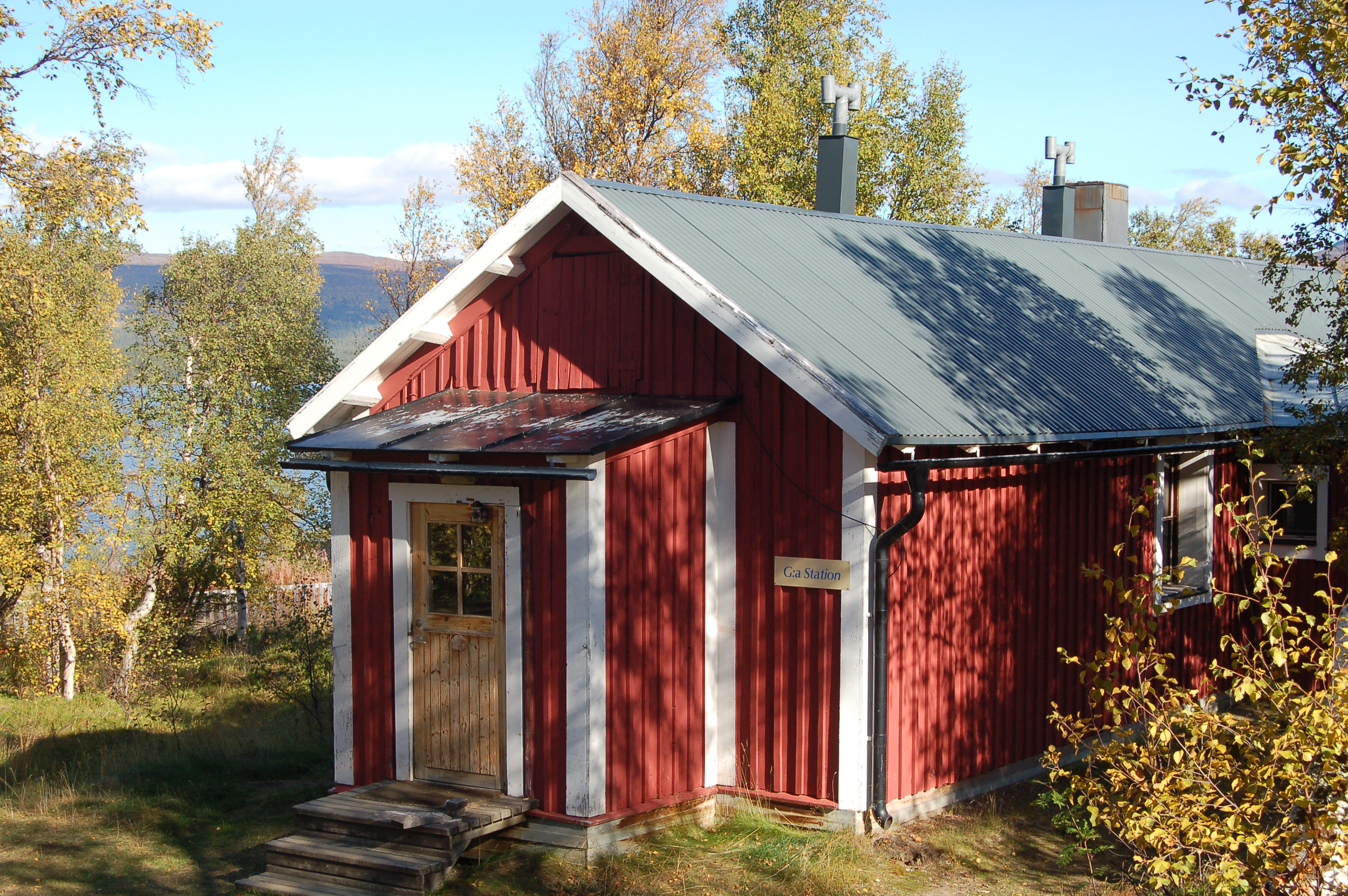 Gamla Station på Saltoluokta Fjällstation